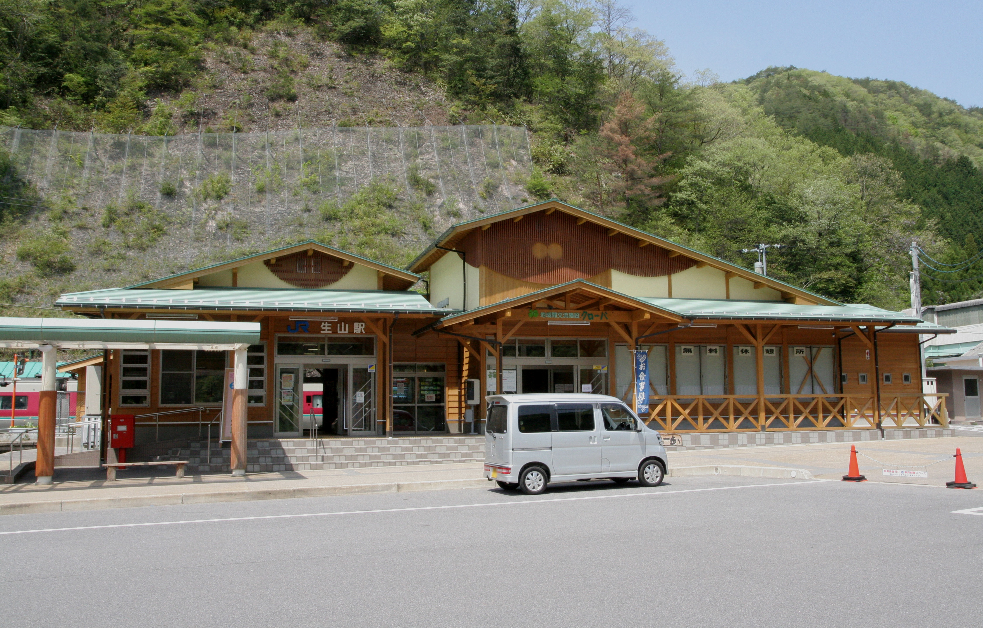 生山駅の駅舎